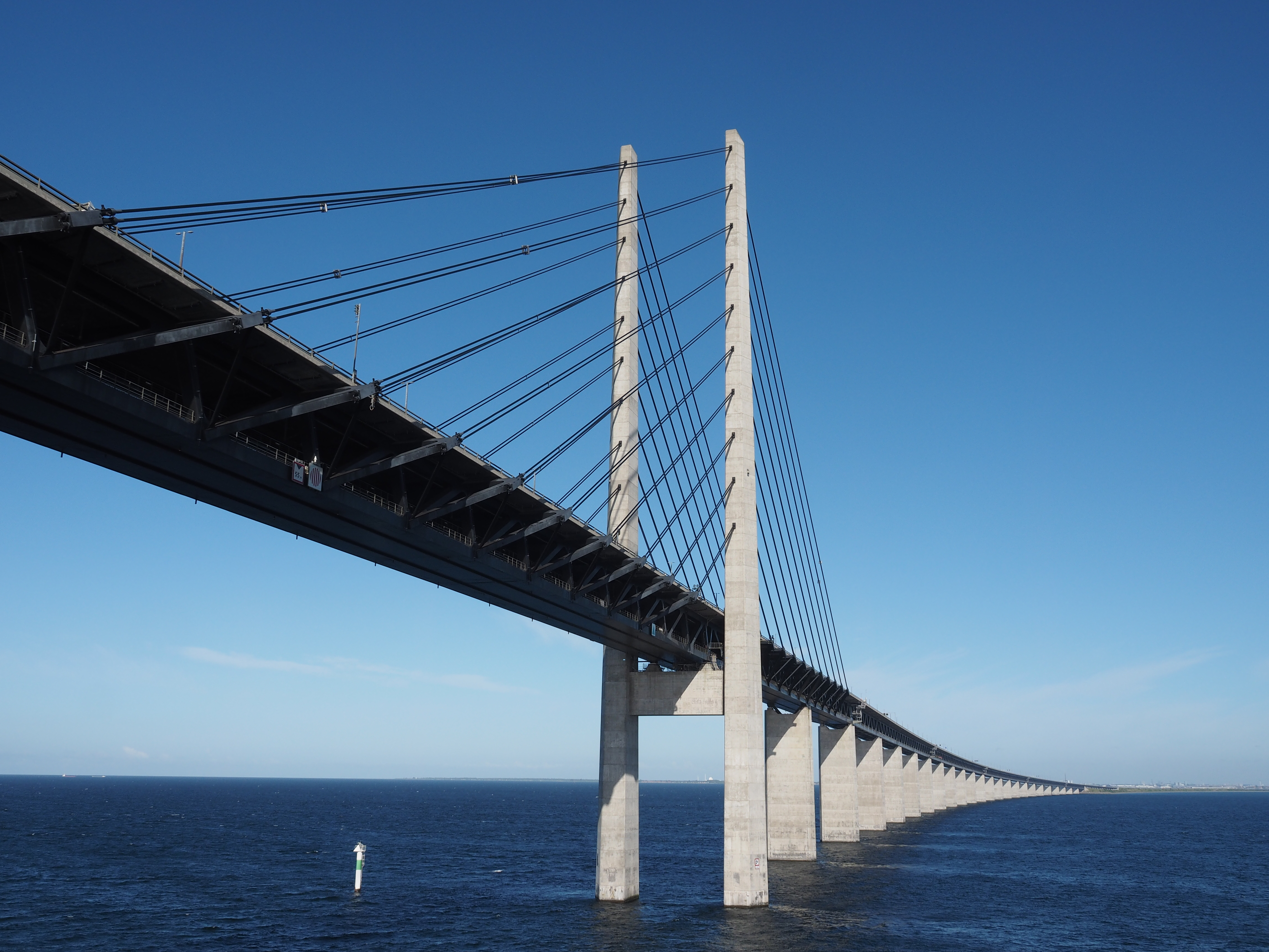 Öresundbrücke Richtung Kopenhagen (Drogdentunnel)